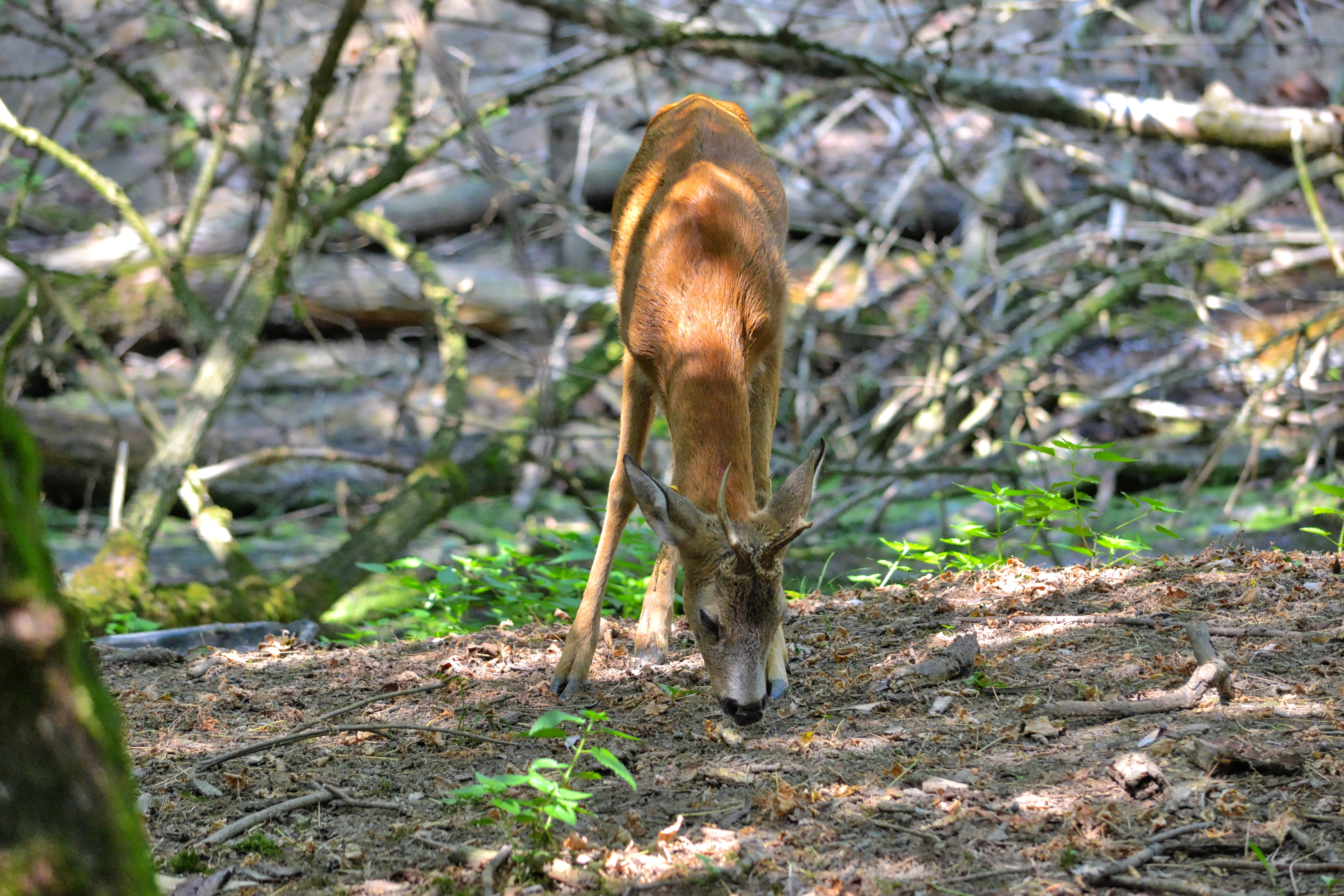 Capriolo